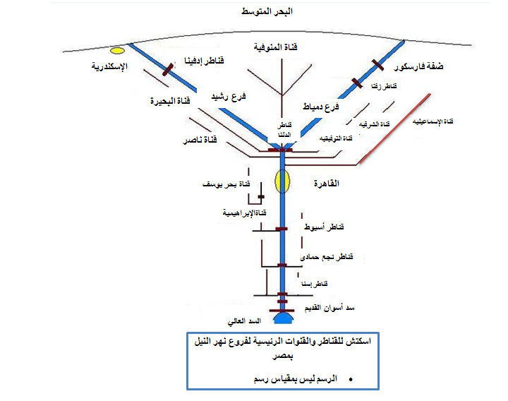 صورة توضح أهم الفروع الرئيسية لنهر النيل مع القنوات الرئيسية والقناطر والسدود.